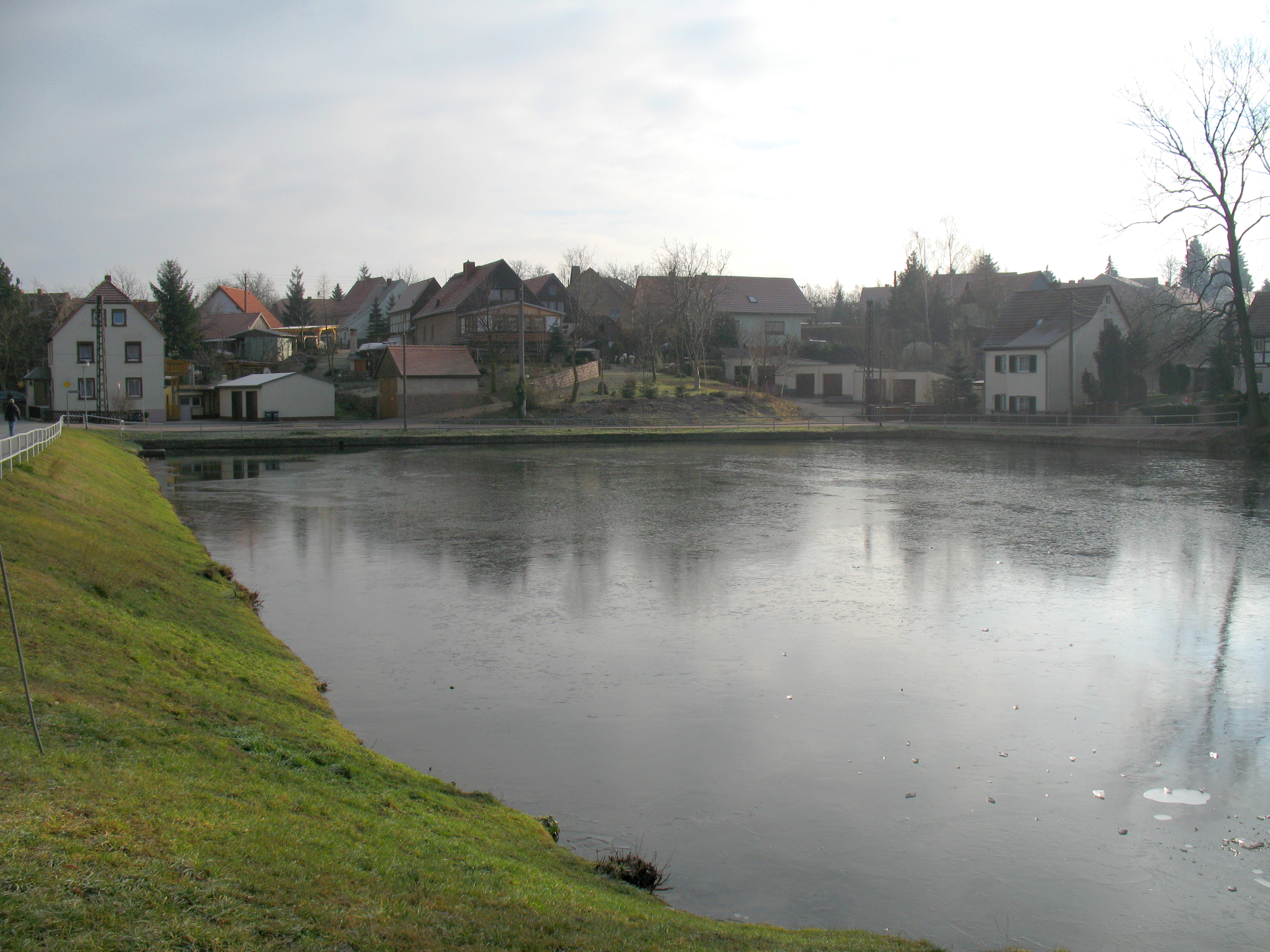 View of Scharfenberg (Klipphausen)